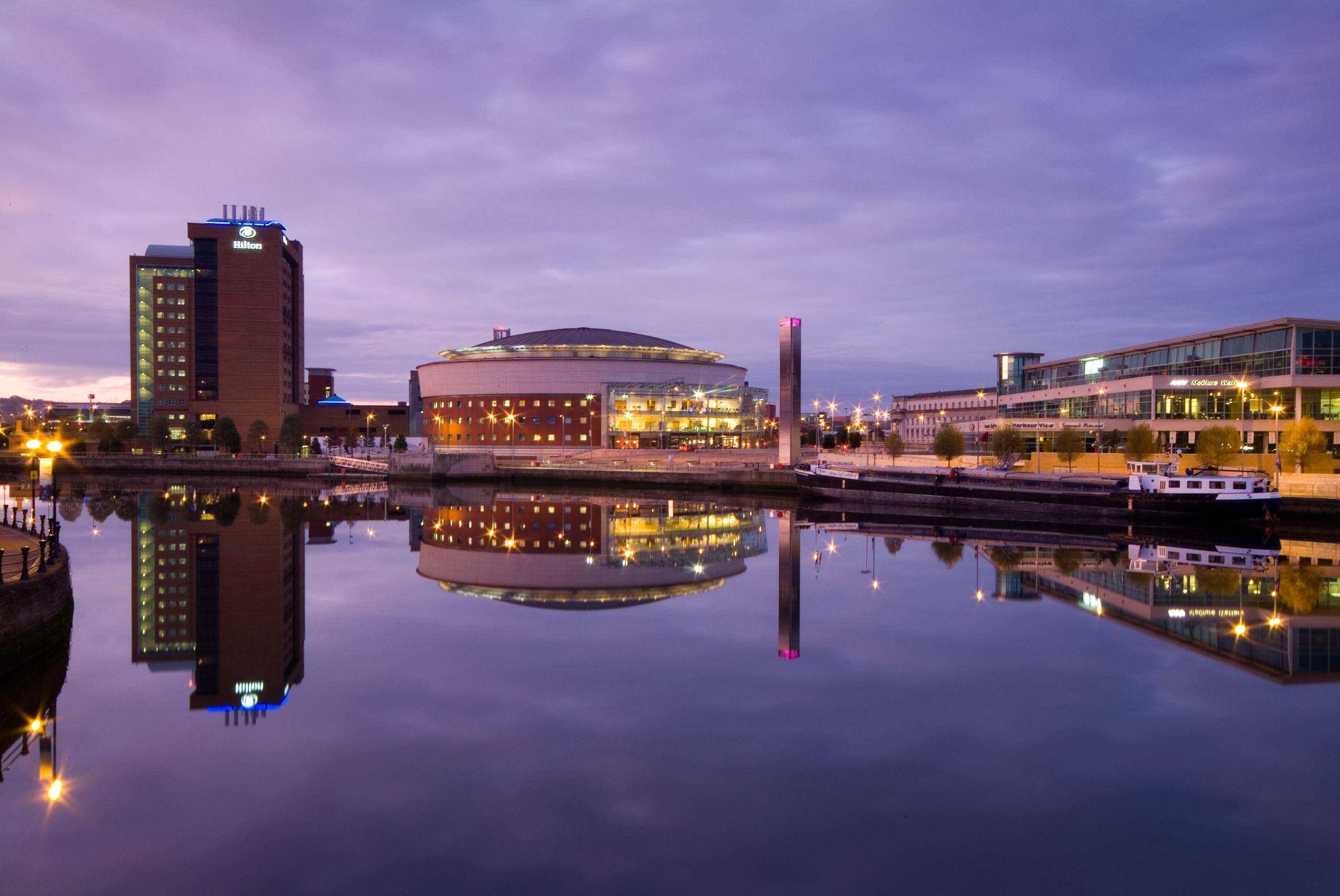 Belfast Laganside